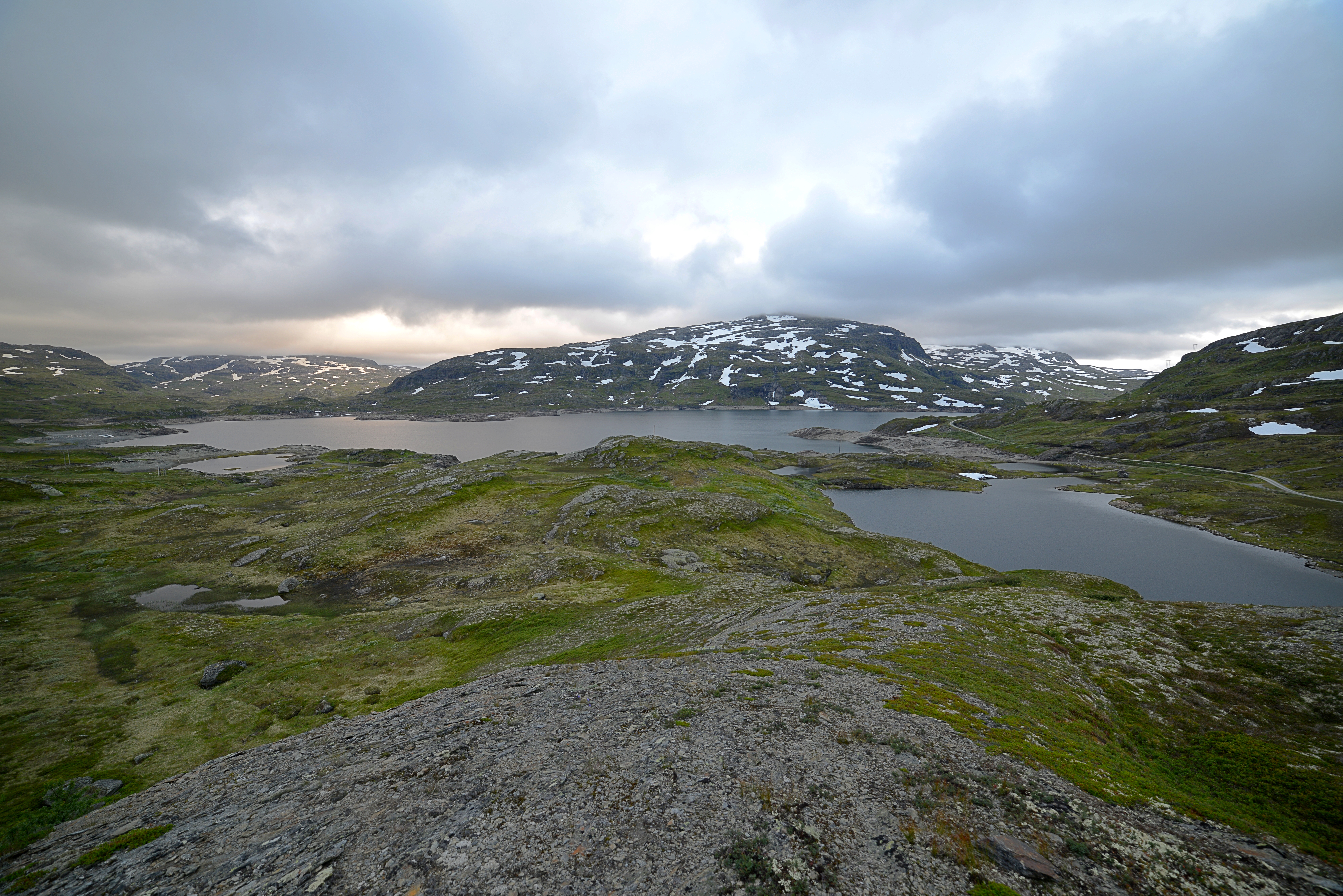 Insjøen Votna i Hordaland